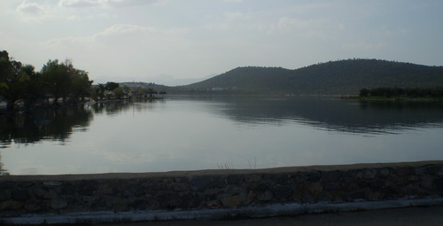 Η παραλία της Τραγάνας